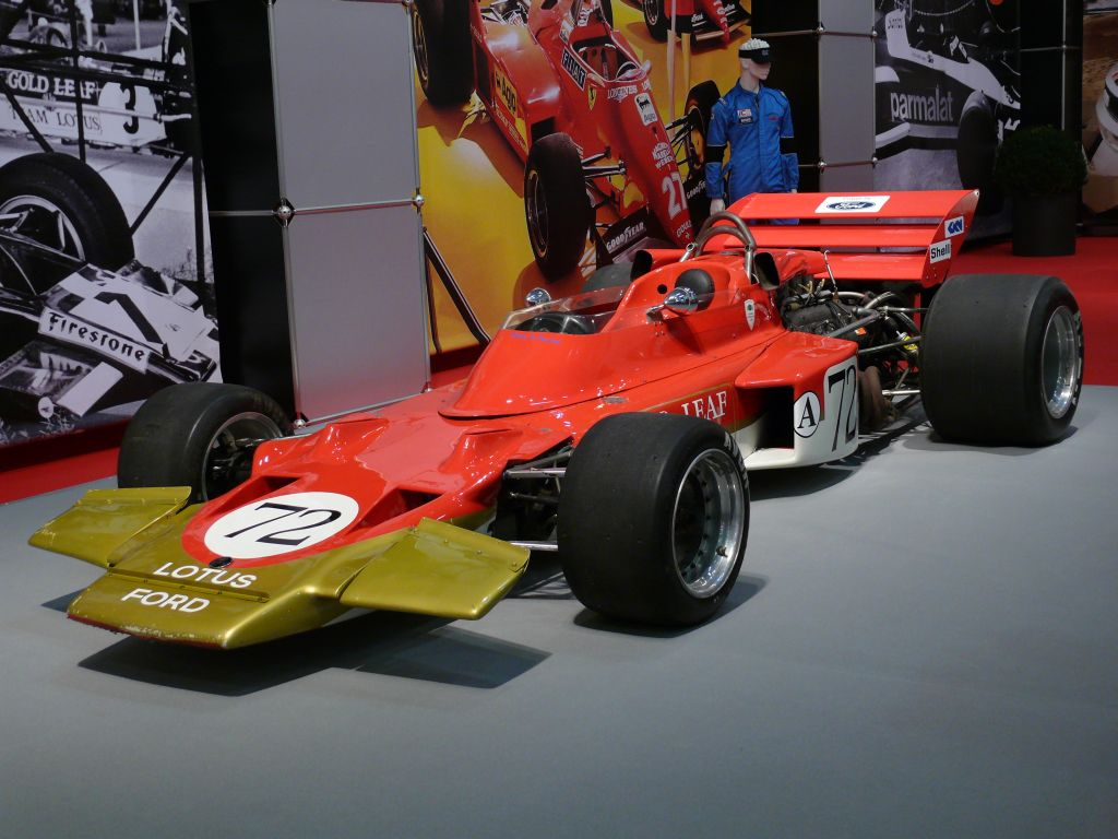 Lotus 72-Ford Cosworth Golden Leaf